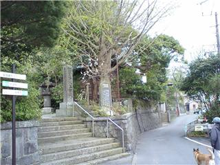 matsubagayatsu